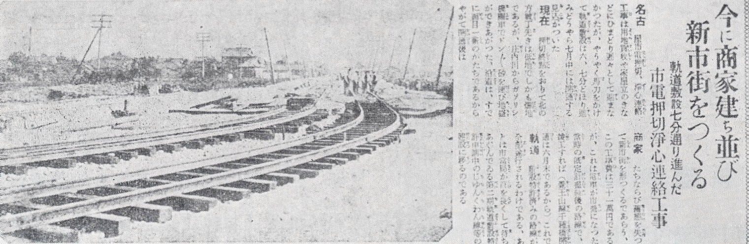 『今に商家建ち並び新市街をつくる 軌道敷設七分通り進んだ 市電押切淨心連絡工事』（昭和2年5月27日付け名古屋新聞）